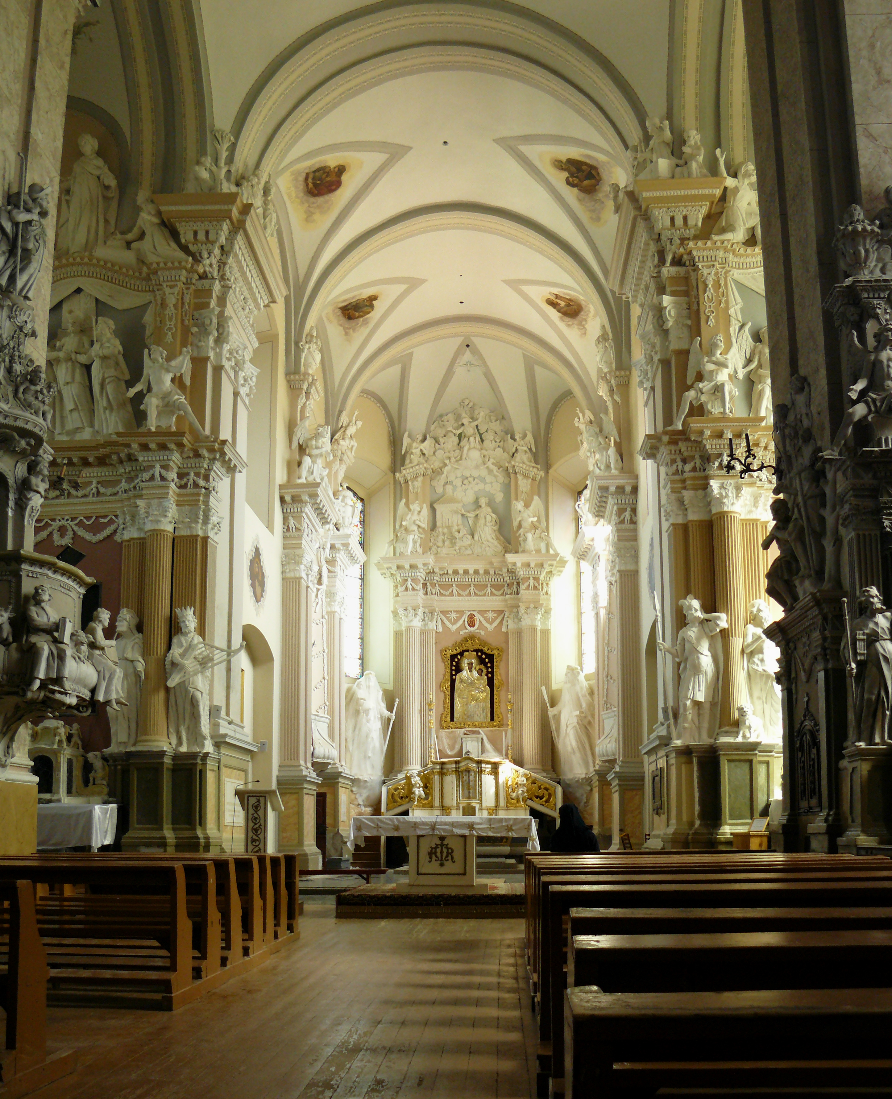 Bendras interjero vaizdas (nuotrauka iš asmeninio R.Bardausko archyvo)